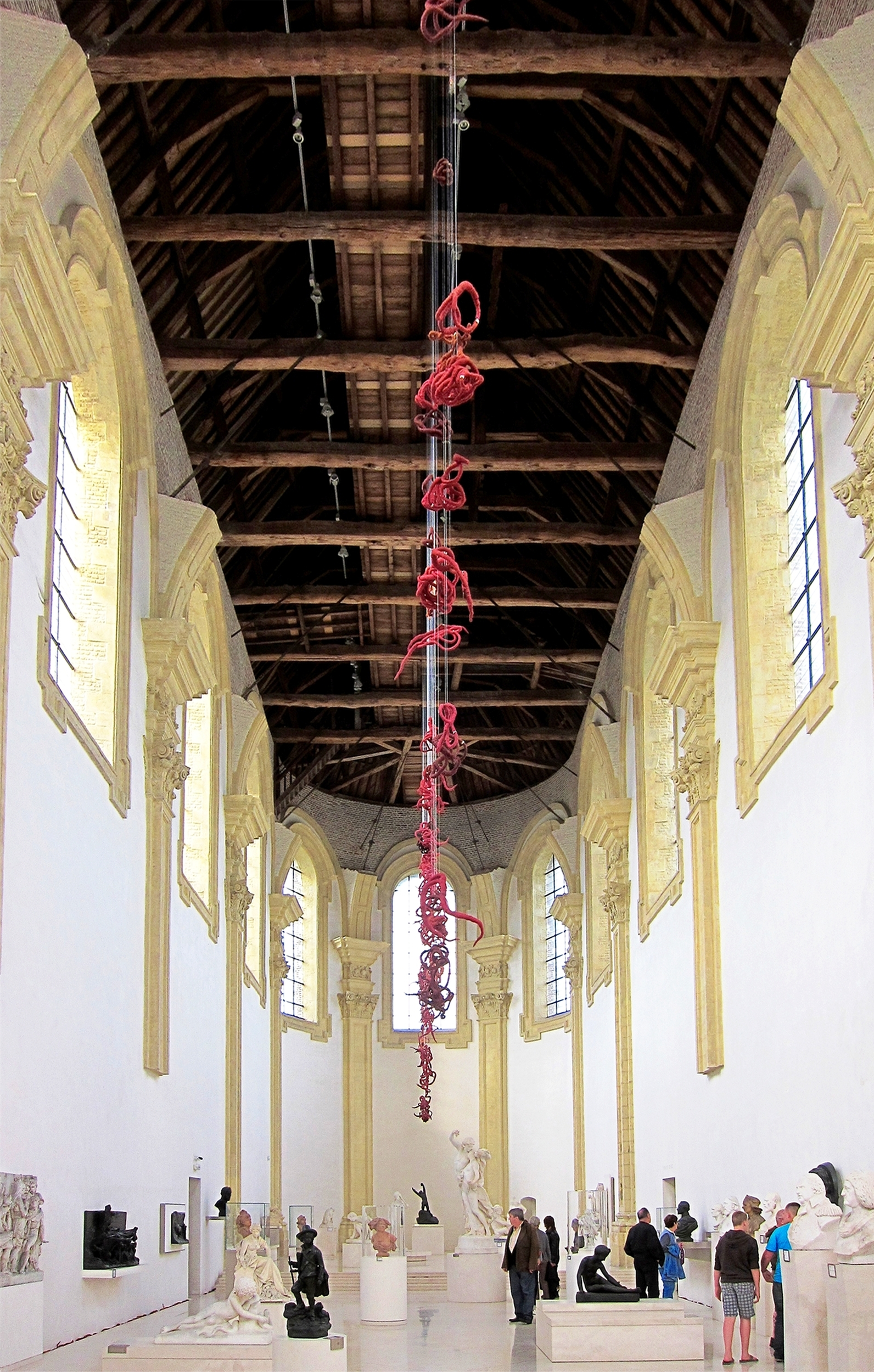 L'intérieur de la chapelle de l'ancien couvent des Chartreux de Douai, aujourd'hui salle des sculptures du musée de la Chartreuse (musée des beaux arts de Douai). .